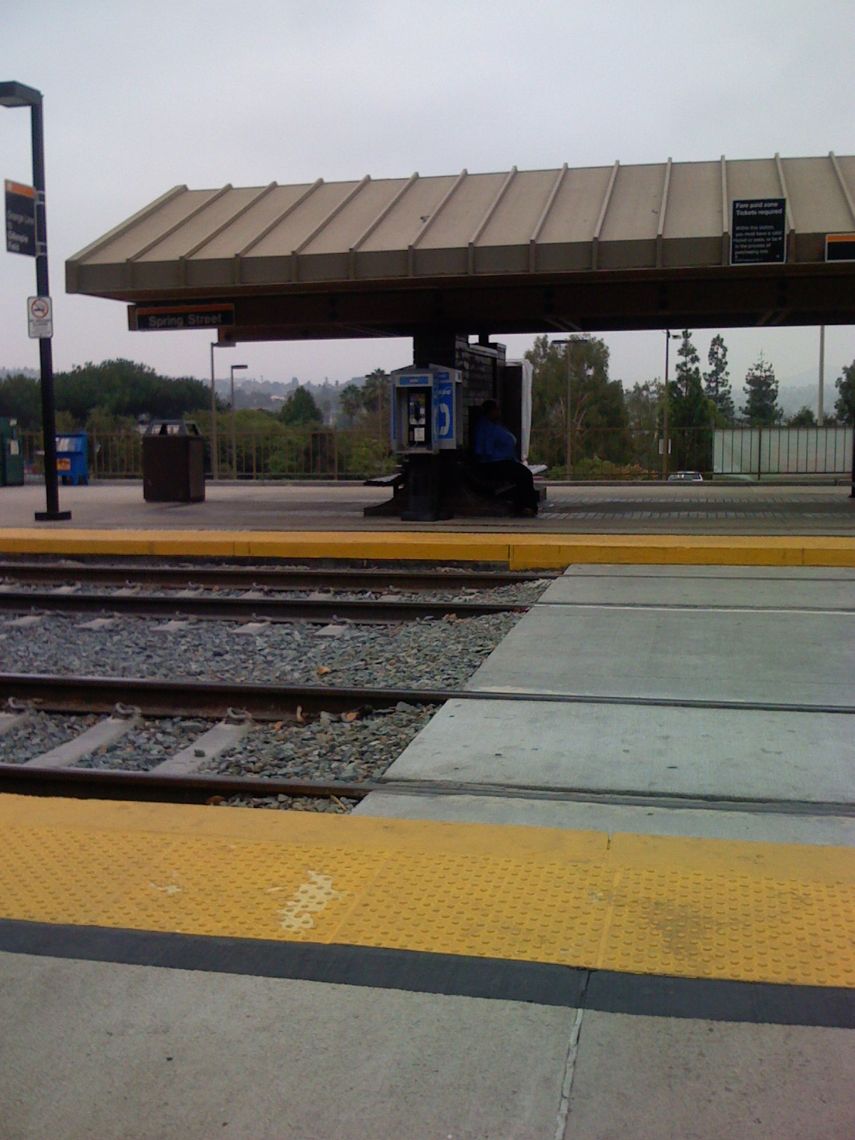 Spring Station - San Diego Orange Line